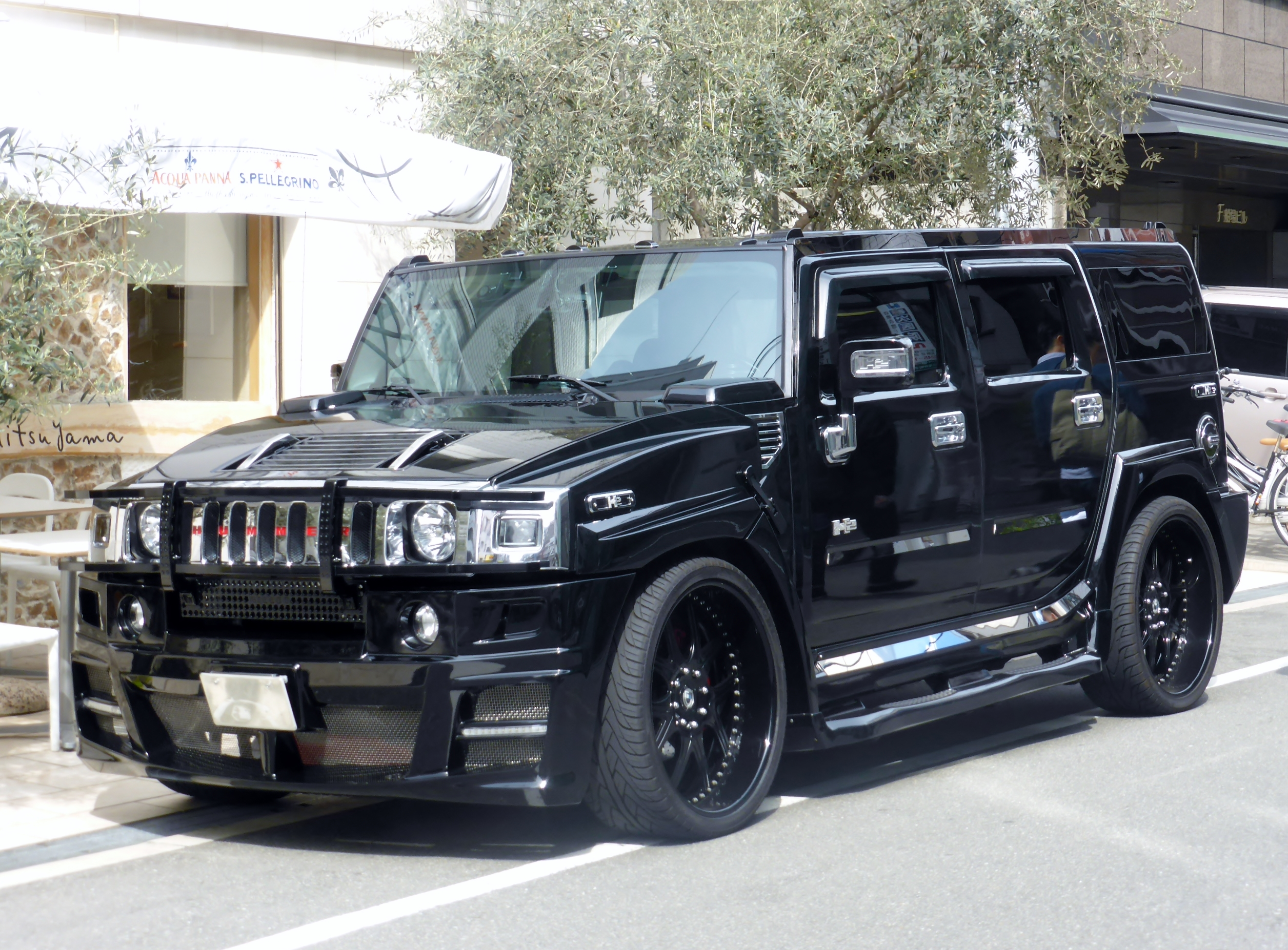 ハマー・H2をフロントから撮影。